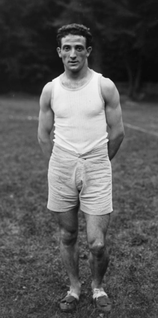 St Cloud [La Faisanderie], 10/9/22, Isola [coureur du C.A.S.G.] : [photographie de presse] / [Agence Rol]